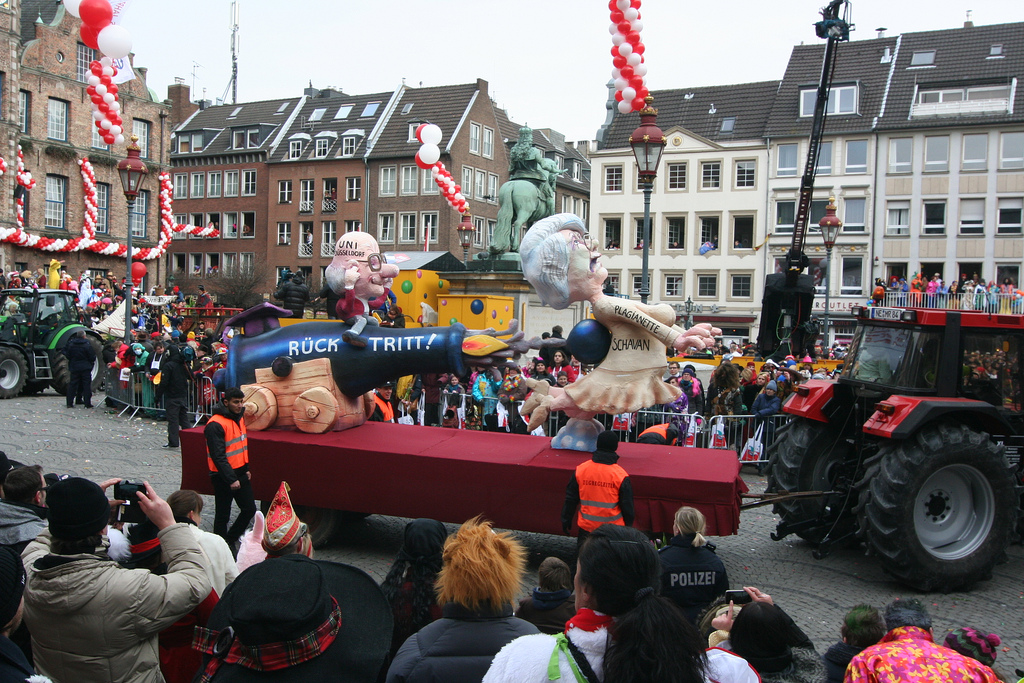 Düsseldorf Karneval 2013